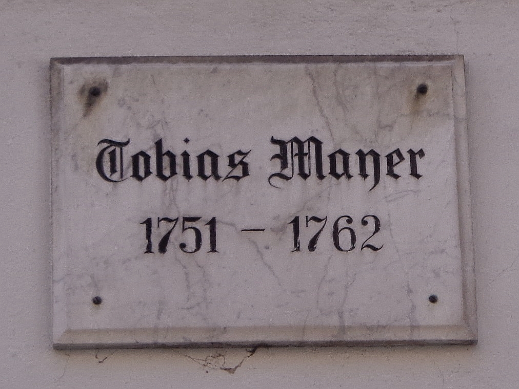 Göttinger Gedenktafel für Tobias Mayer, Physiker und Astronom (Lange Geismarstraße 49)